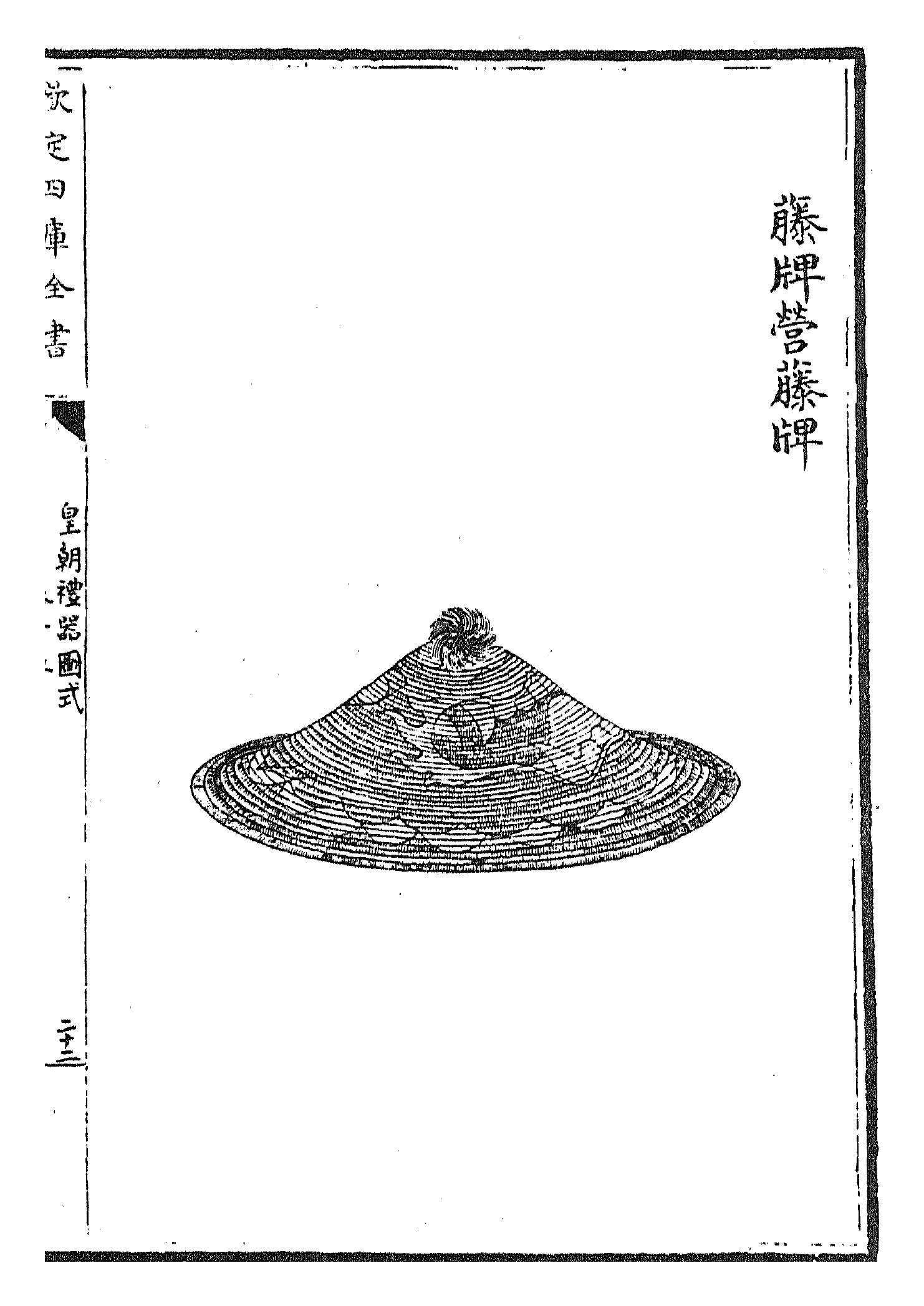 《皇朝禮器圖式》卷十五 藤牌營藤牌